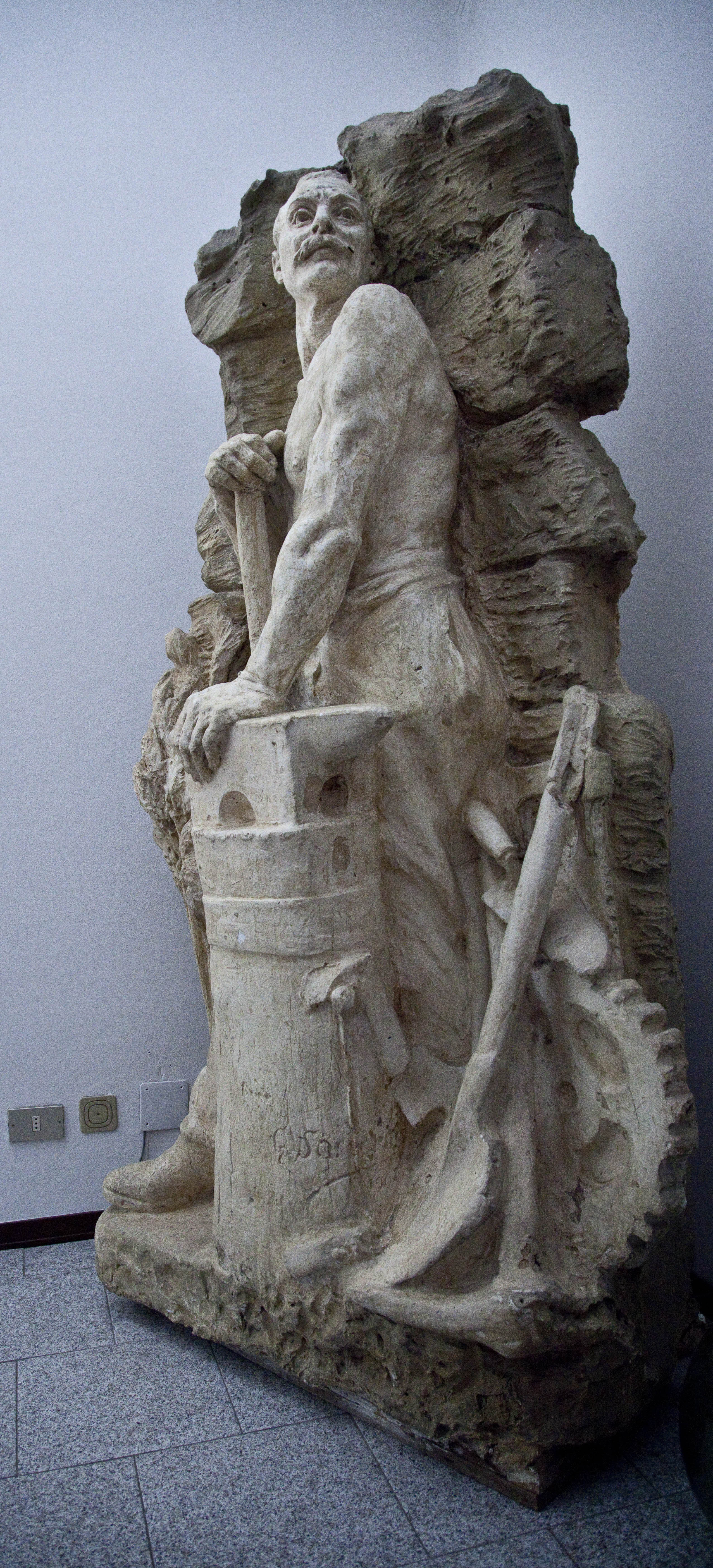 "Il lavoro" opera in gesso di Giuseppe Sartorio sita a Cavallirio